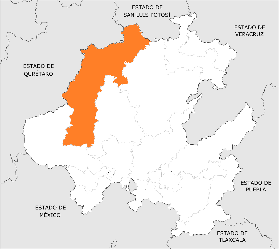 Distrito Electoral Local de Hidalgo 01